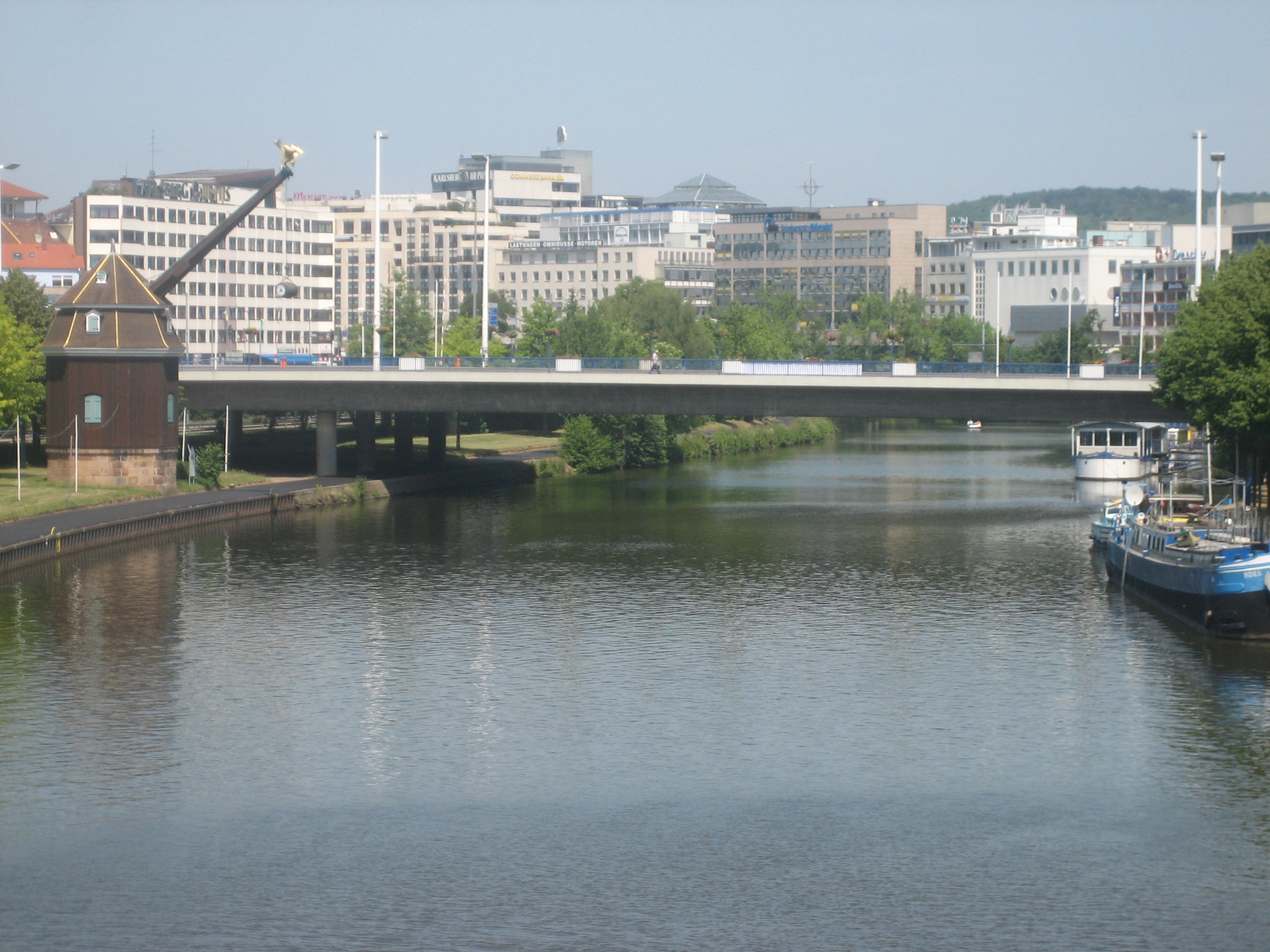 Saarbrücken, Saar river.